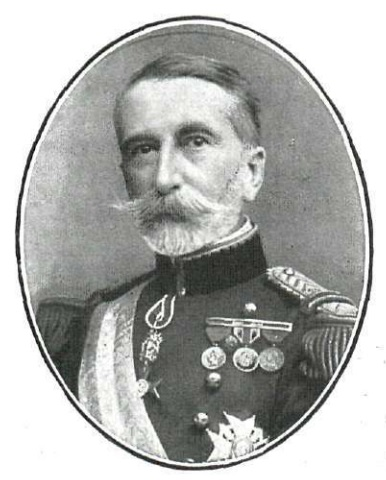 Excmo. Sr. Marqués de Comillas. Comisario regio de la Exposición.—Fot. Kaulak